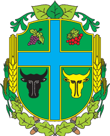 Герб Новоселицького району, Чернівецька область